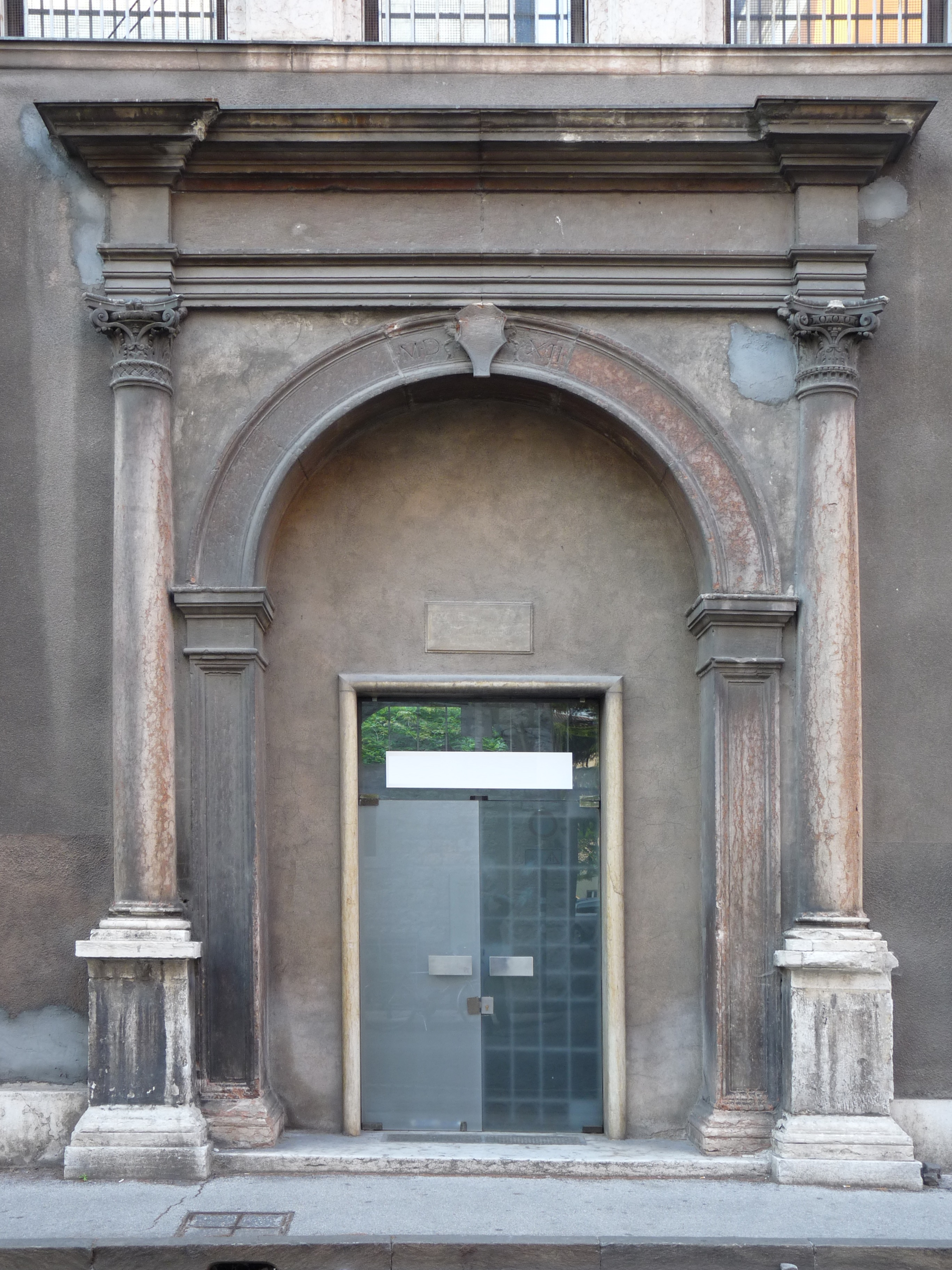 Portale di Palazzo a Prato, unica parte residua del palazzo. L'immagine originale è di Matteo Ianeselli Questa è una elaborazione con modifiche di prospettiva e di altri particolati secondari (scritte ed insegna)